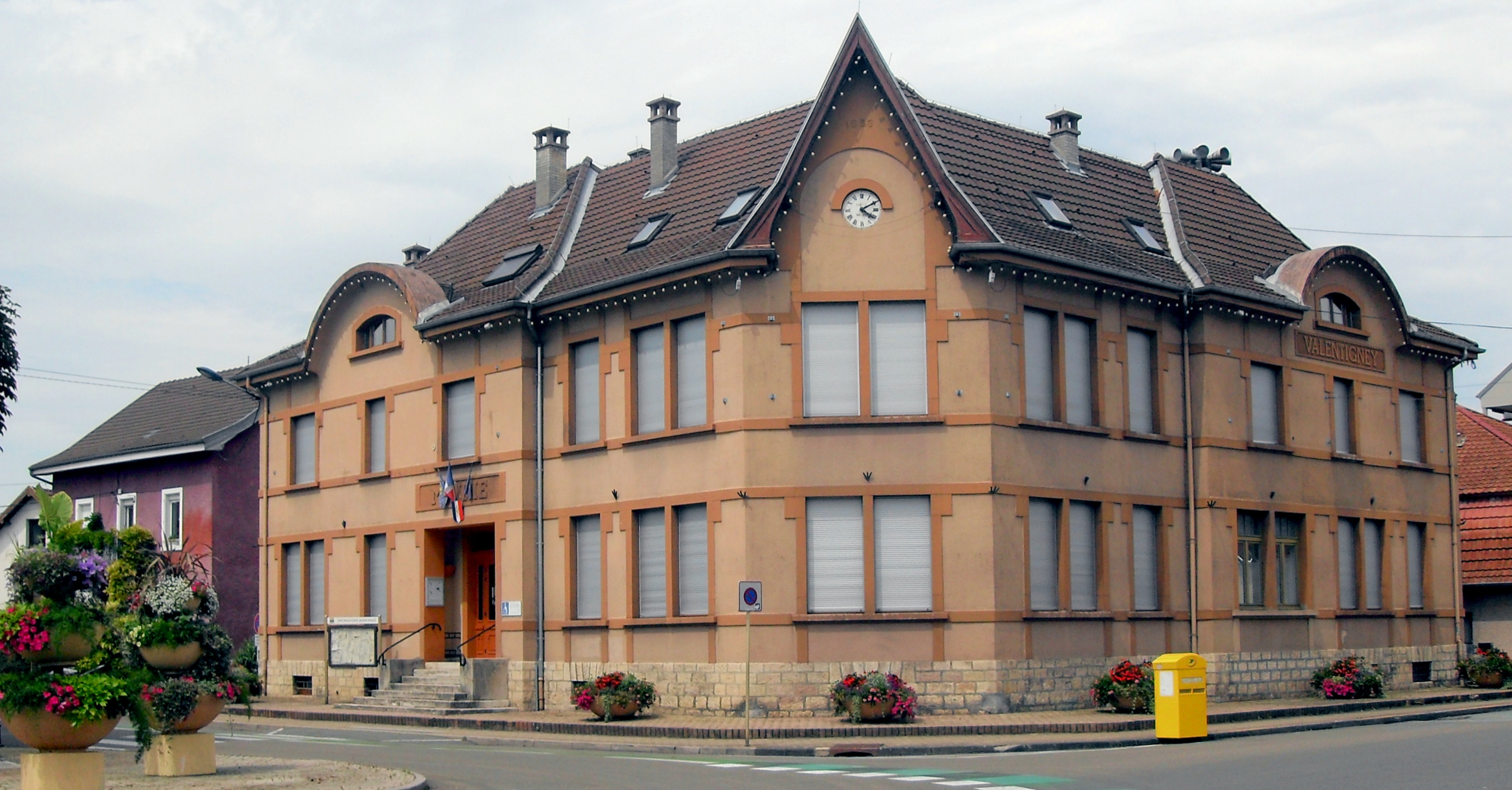 La mairie de Valentigney